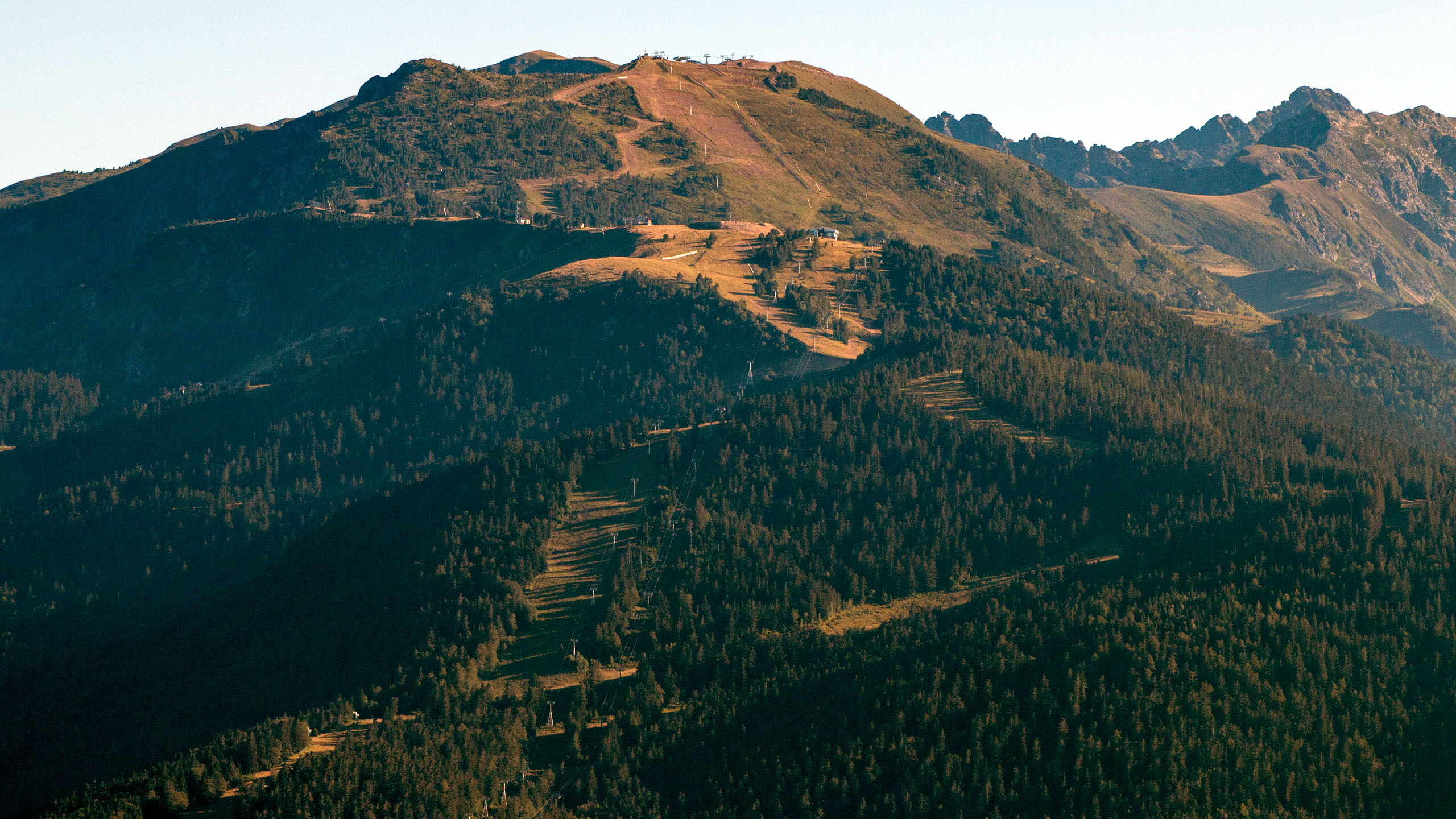 Vue du Cioula